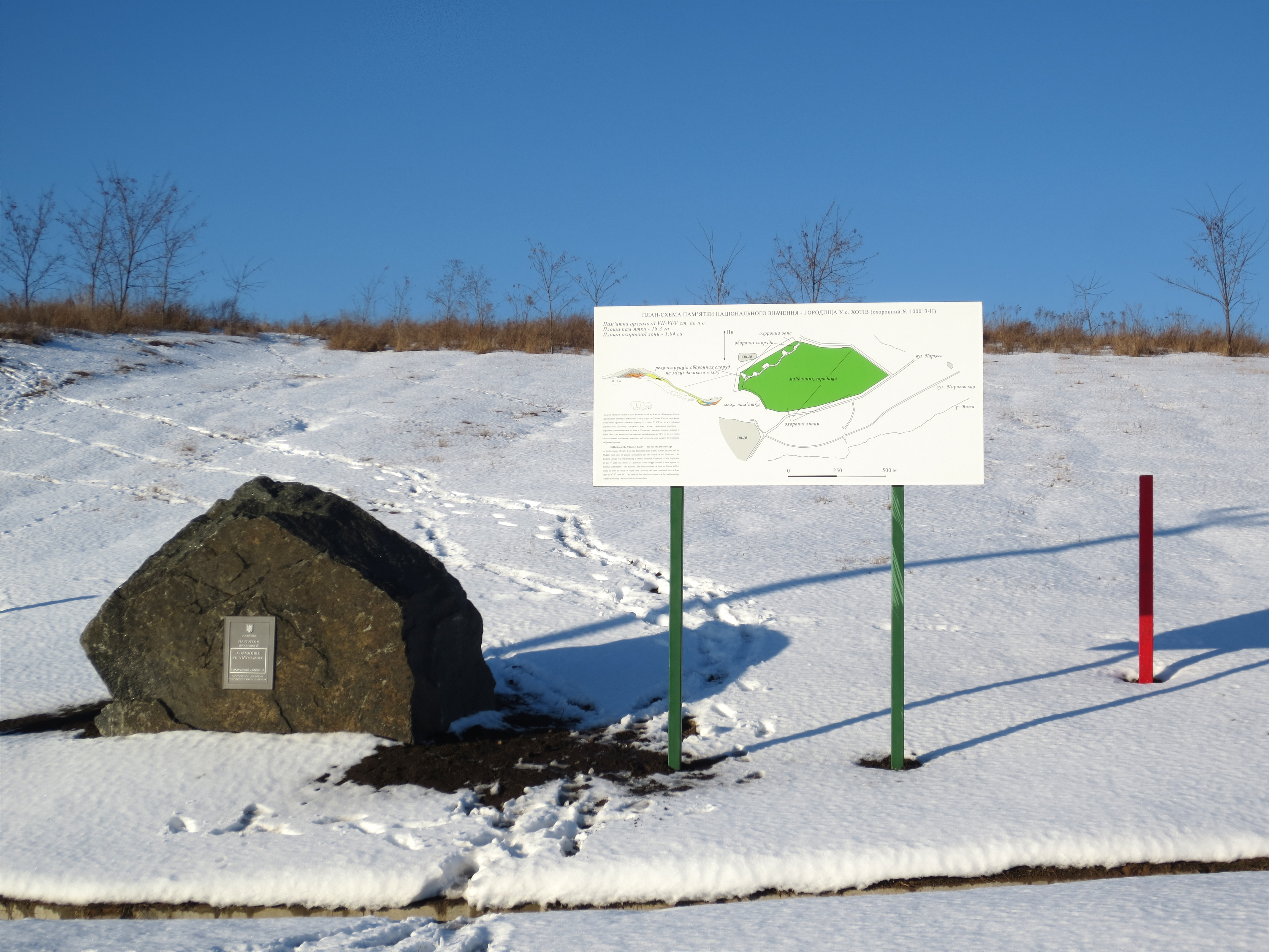 Хотівське городище. Південно-західна частина, біля дороги ("вулиці Паркової"). Камінь з охоронною табличкою, інформаційне табло та один з червоних стовпчиків, що позначають нову межу пам'ятки.